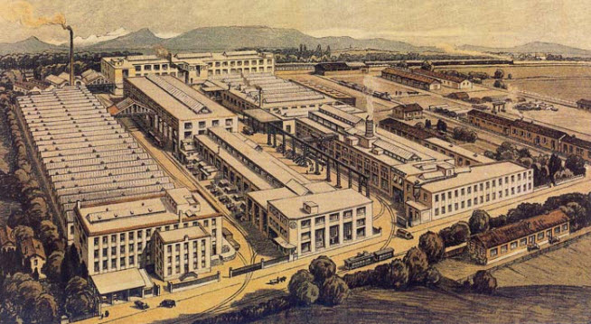 Werksgelände der Ateliers Piccard-Pictet & Cie. von der Route de Lyon aus gesehen um 1920. Blick richtung Süden. Zuhindest quer die Automontagehalle. Links die mechanische Bearbeitung und das Zentrallager für die Autoproduktion.